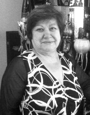 Anoush Ghazaryan